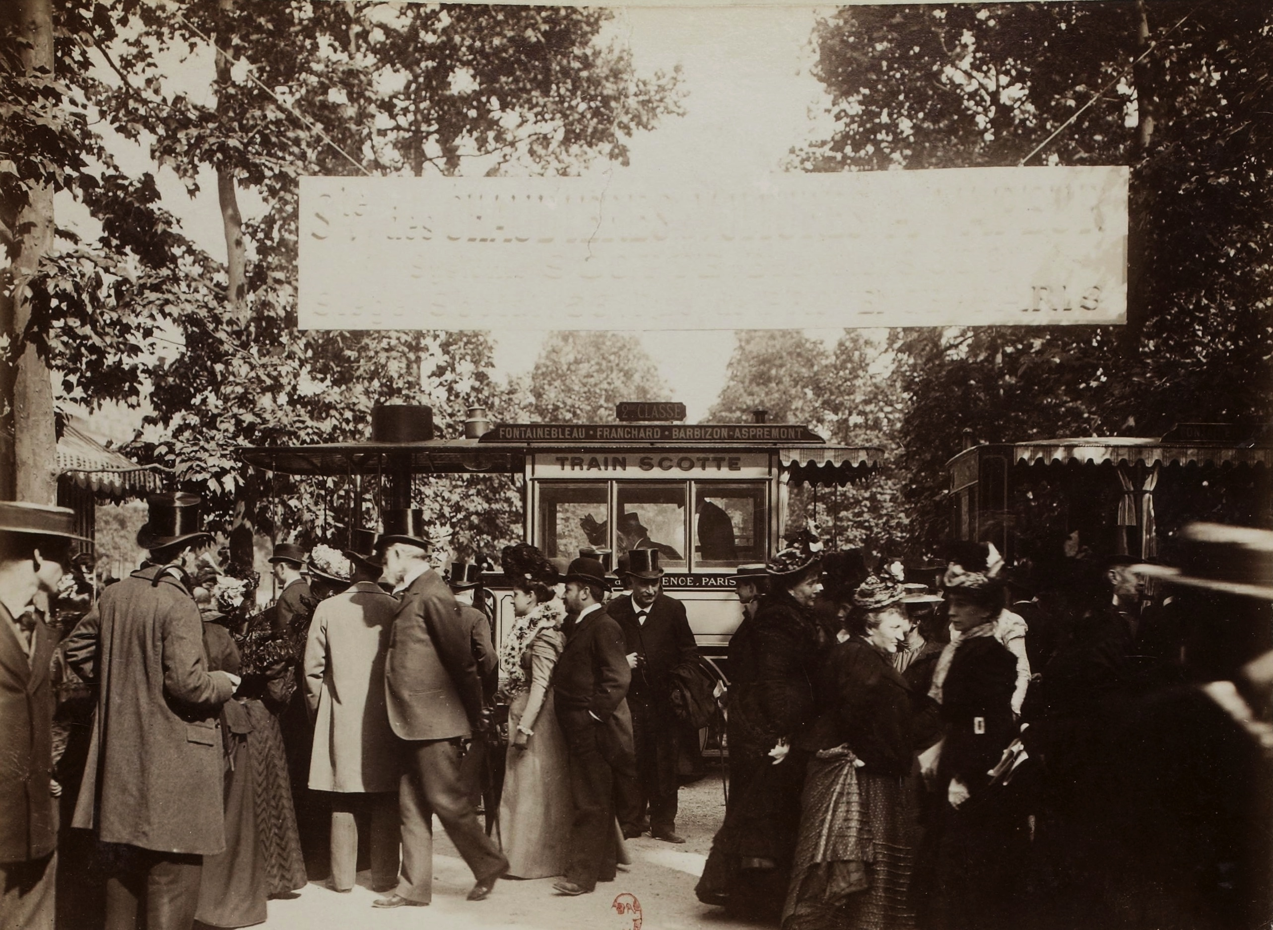 [Collection Jules Beau. Photographie sportive] : T. 7. Année 1898 / Jules Beau : F. 14v. Train Scotte ; Laszewski